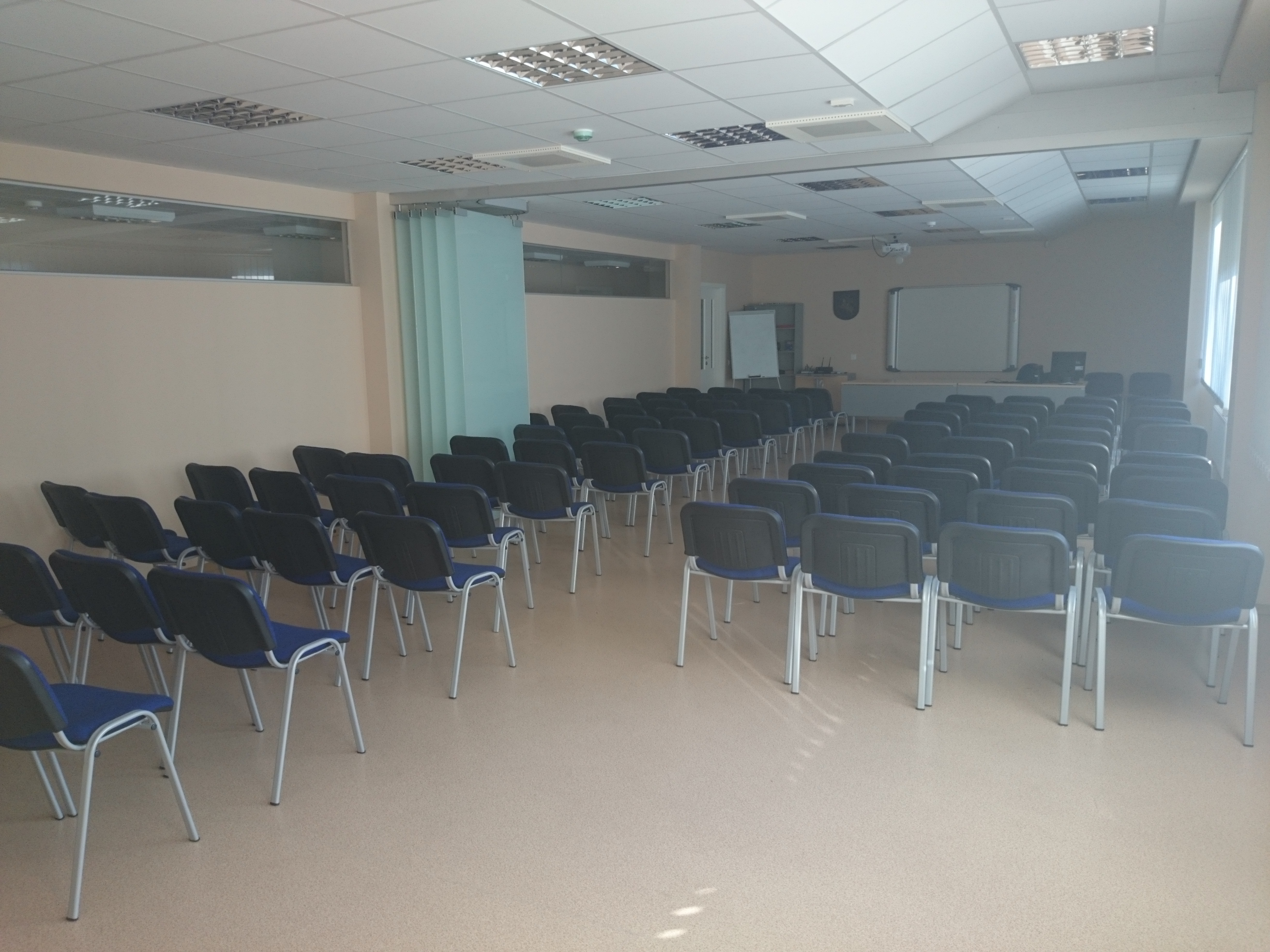 AchMC Jonava